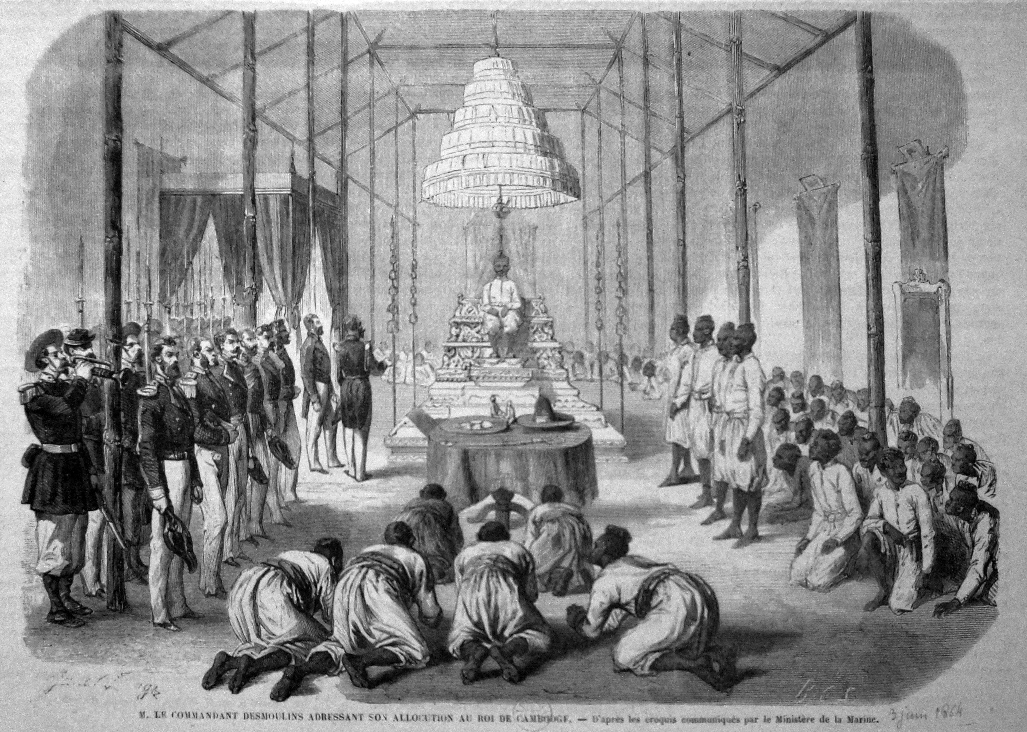 Présenté lors de l'exposition Indochine des territoires et des hommes 1856 1956.